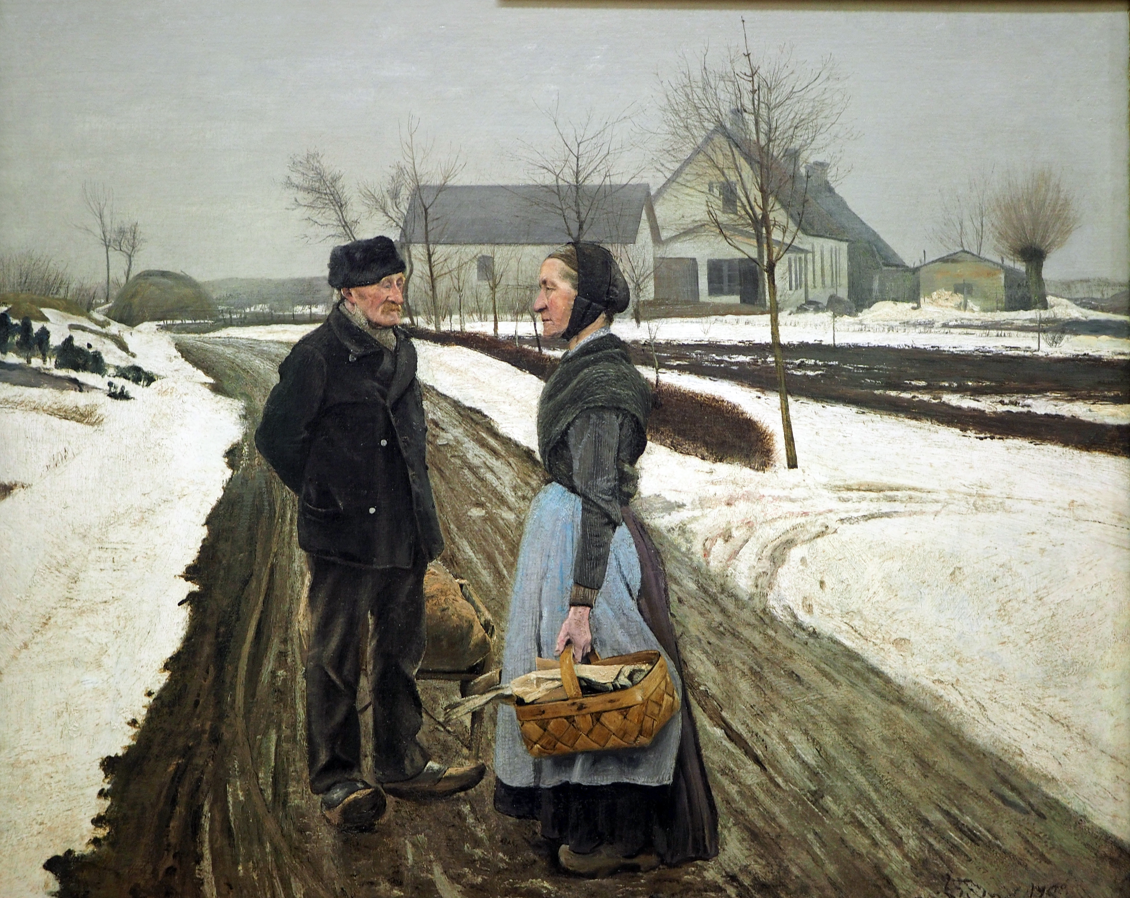 Im Vordergrund stehen zwei Personen auf einer ansonsten menschenleeren Straße. Ihre Blicke gehen aneinander vorbei. Jeder scheint jeweils für sich inne zu halten. Die Gesichter der Beiden sind von der Kälte gerötet.